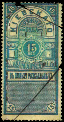 Марка сбора в пользу судебных рассыльных, Киевский окружной суд